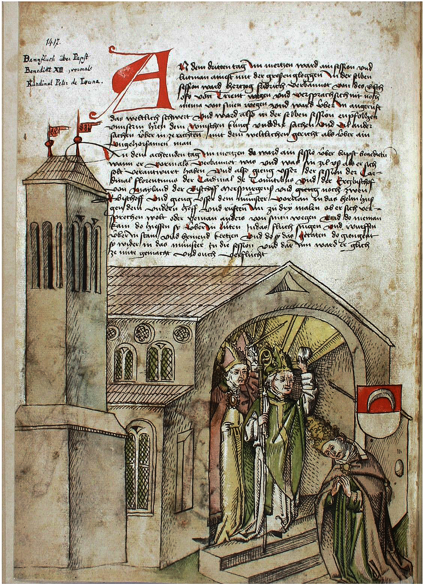 Benoît XIII Déposition par le concile de Constance, Rosengartenmuseum